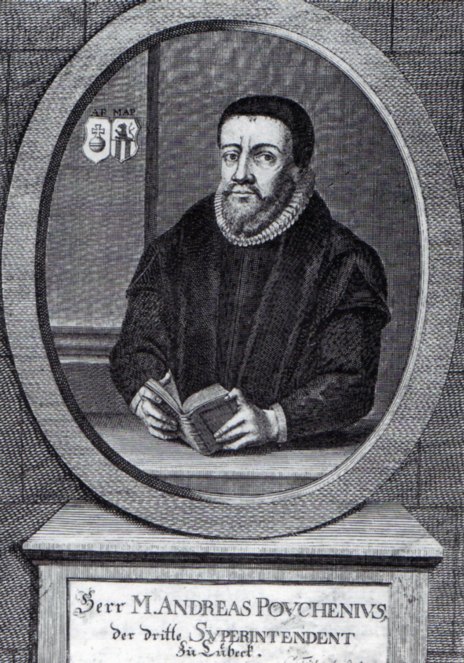 Andreas Pouchenius (* 30. November 1526; † 13. Oktober 1600), lutherischer Theologe und Superintendent in Lübeck. Kupferstich des 18. Jahrhunderts nach einem Holzschnitt des 16. Jahrhunderts